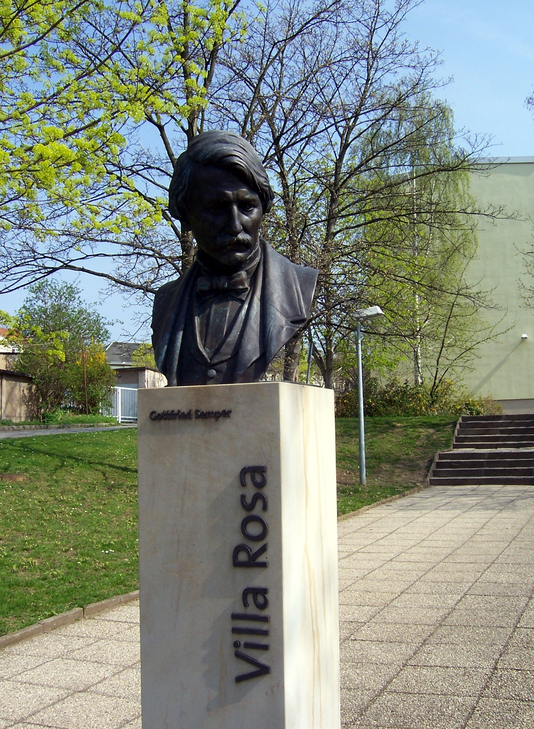 Gedenkstele an der Stelle der zerstörten Villa Rosa mit einer Büste des Erbauers Gottfried Semper.